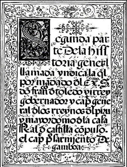 Portada de la segunda parte de la Historia Indica de Pedro Sarmiento de Gamboa.